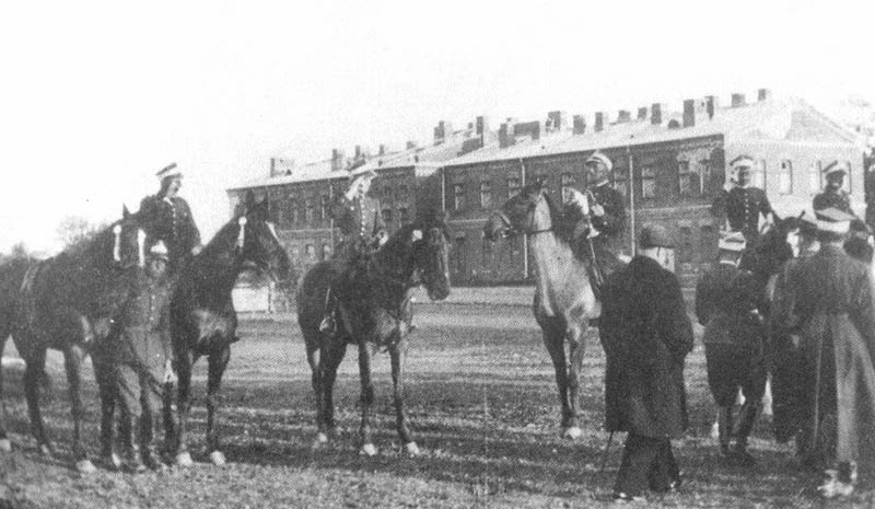 Garnizon Przasnysz, 1929r. 4 szwadron 11 Pułku na placu koszarowym